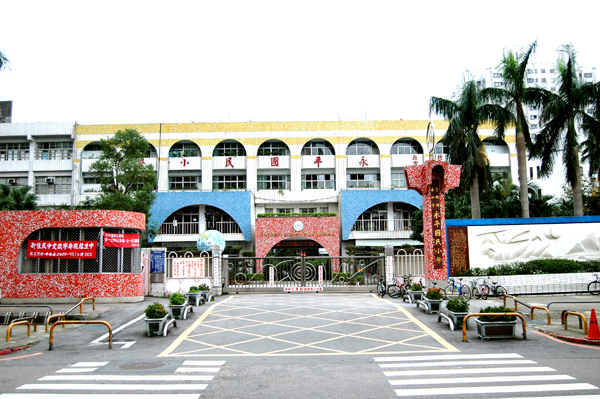 中文（台灣）: 臺北縣永和市永平國小。